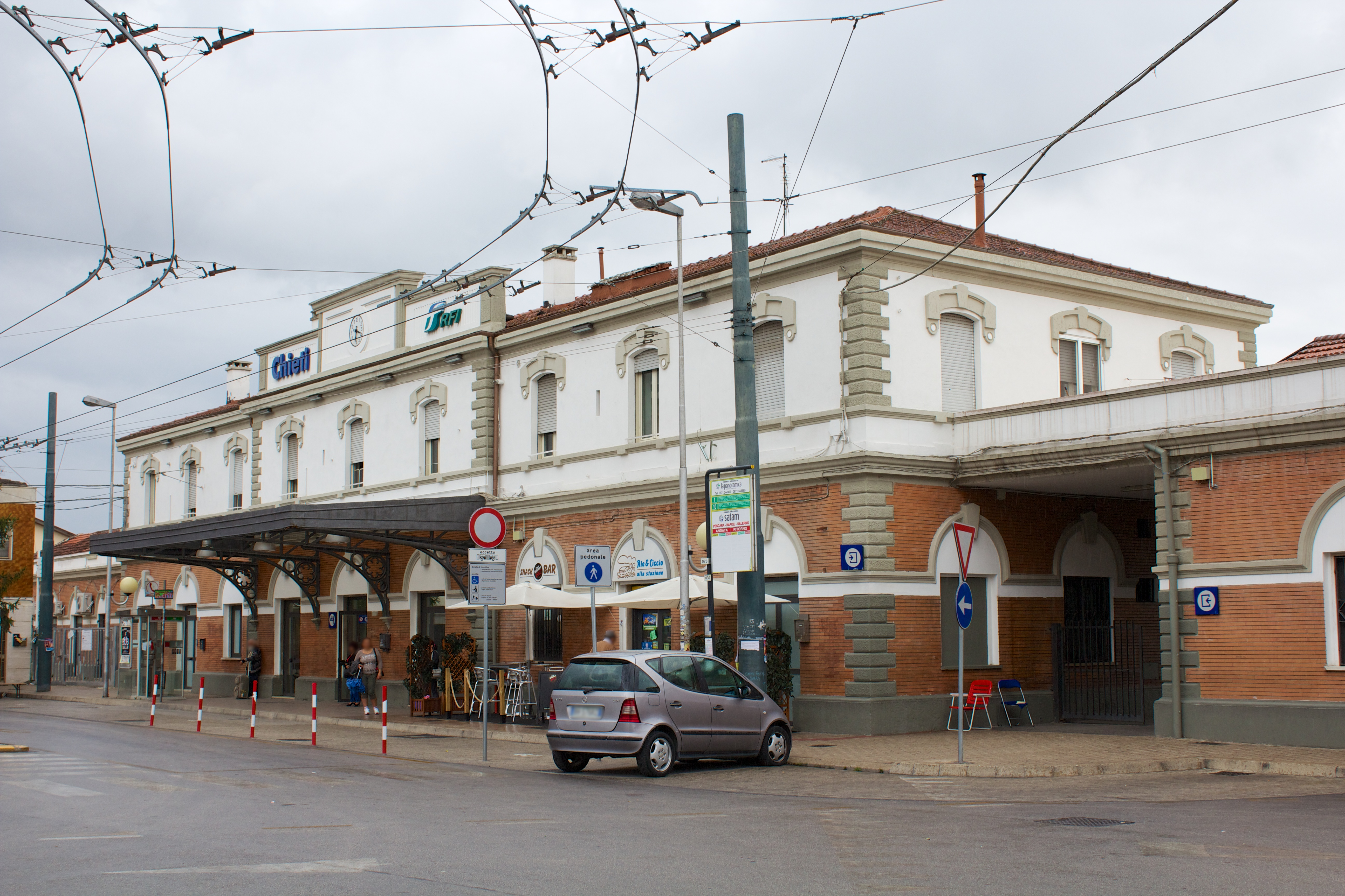 Stazione di Chieti